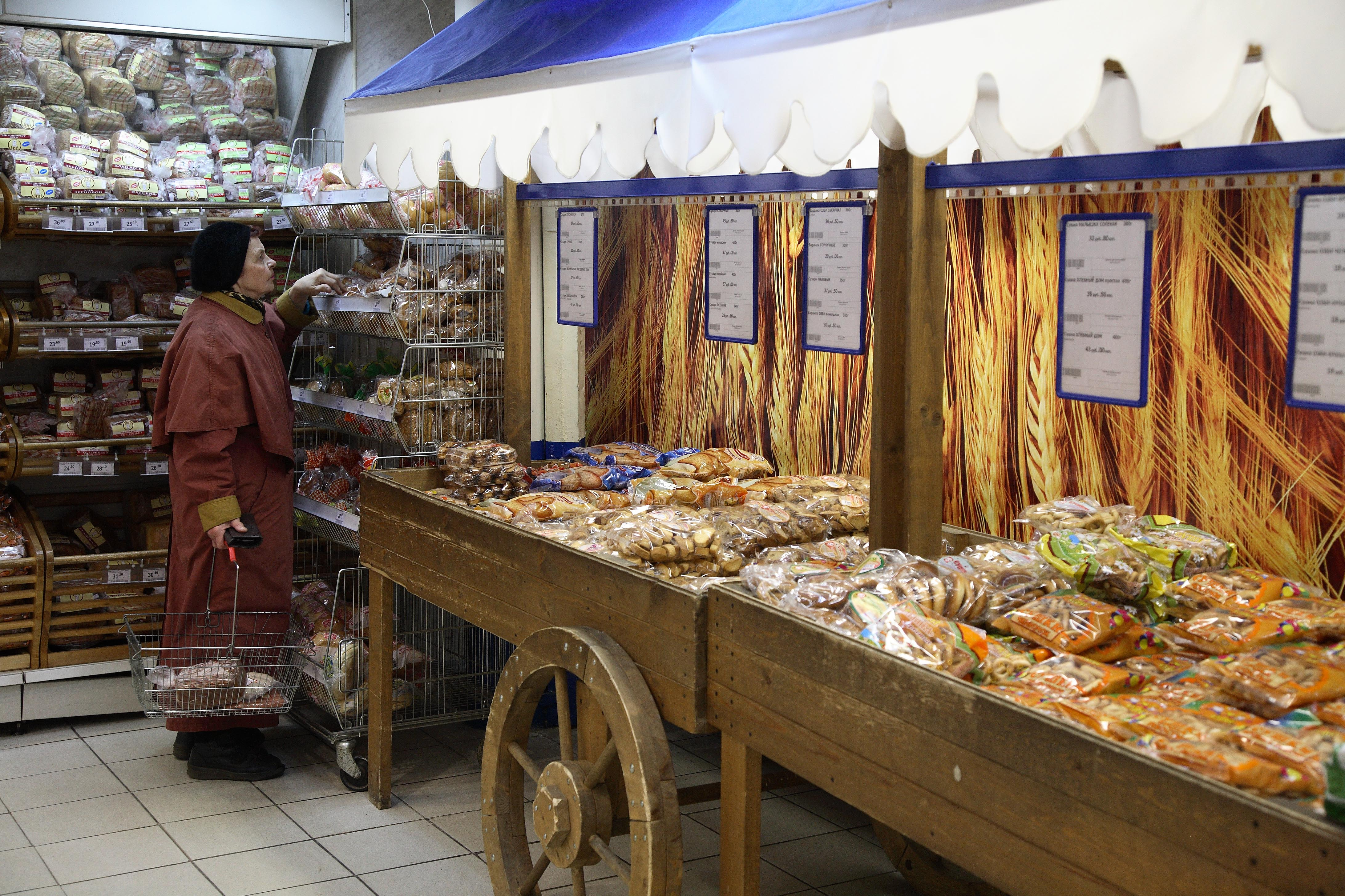 Выкладка хлебобулочных изделий в торговом зале.